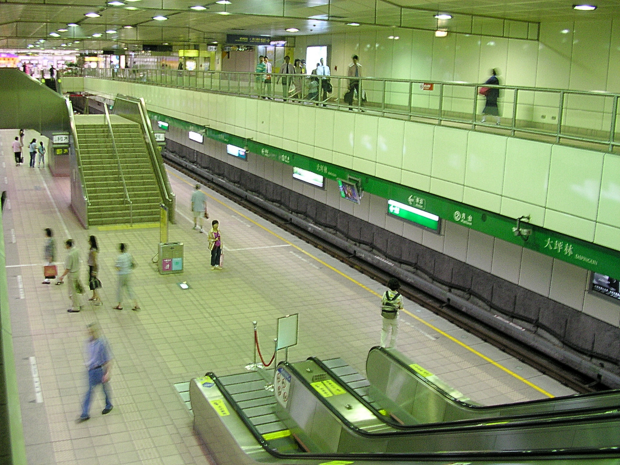 Inside Taipei MRT Dapinglin Station